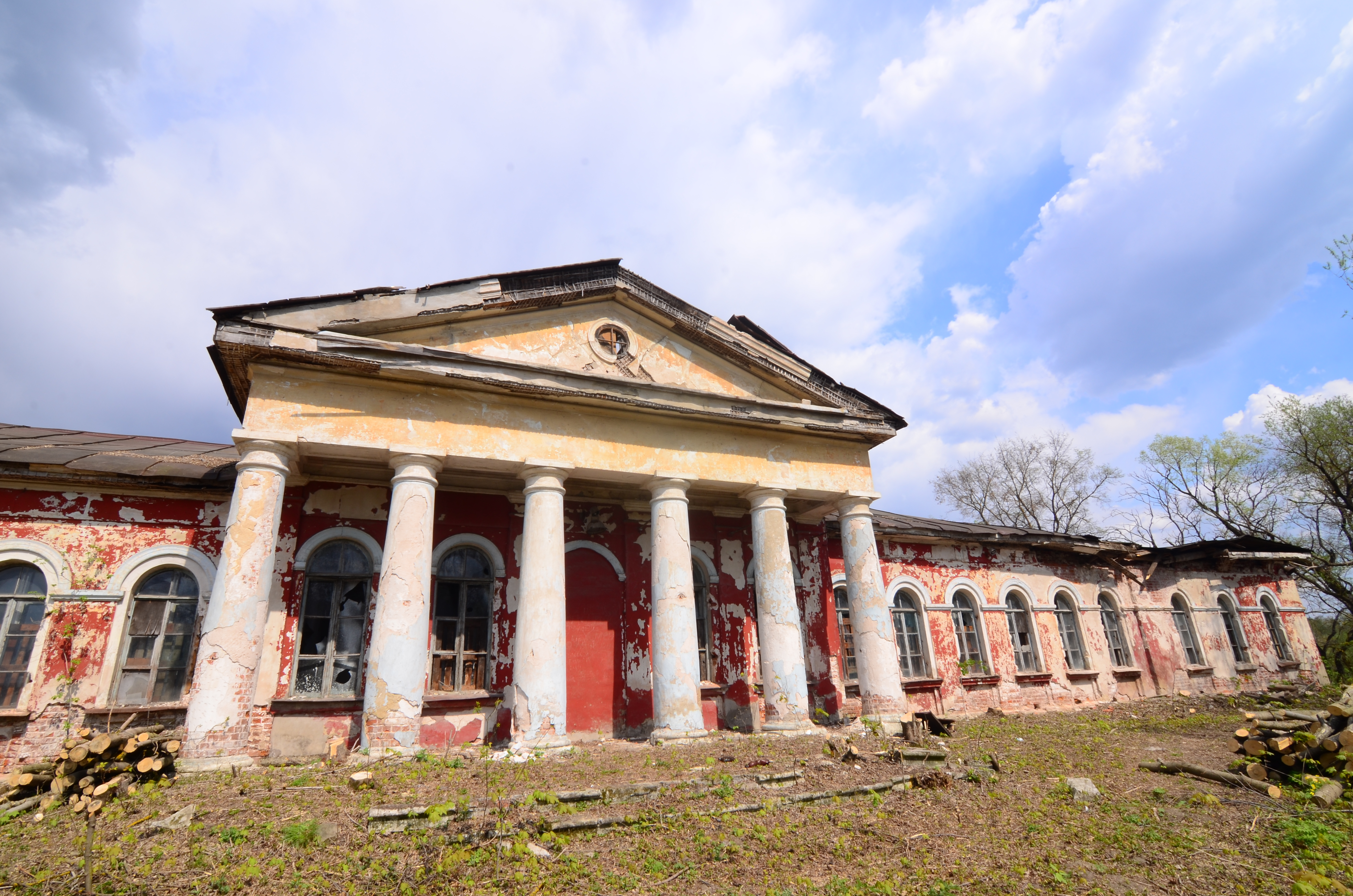 Конный двор: Пески, Коломенский район, Московская область